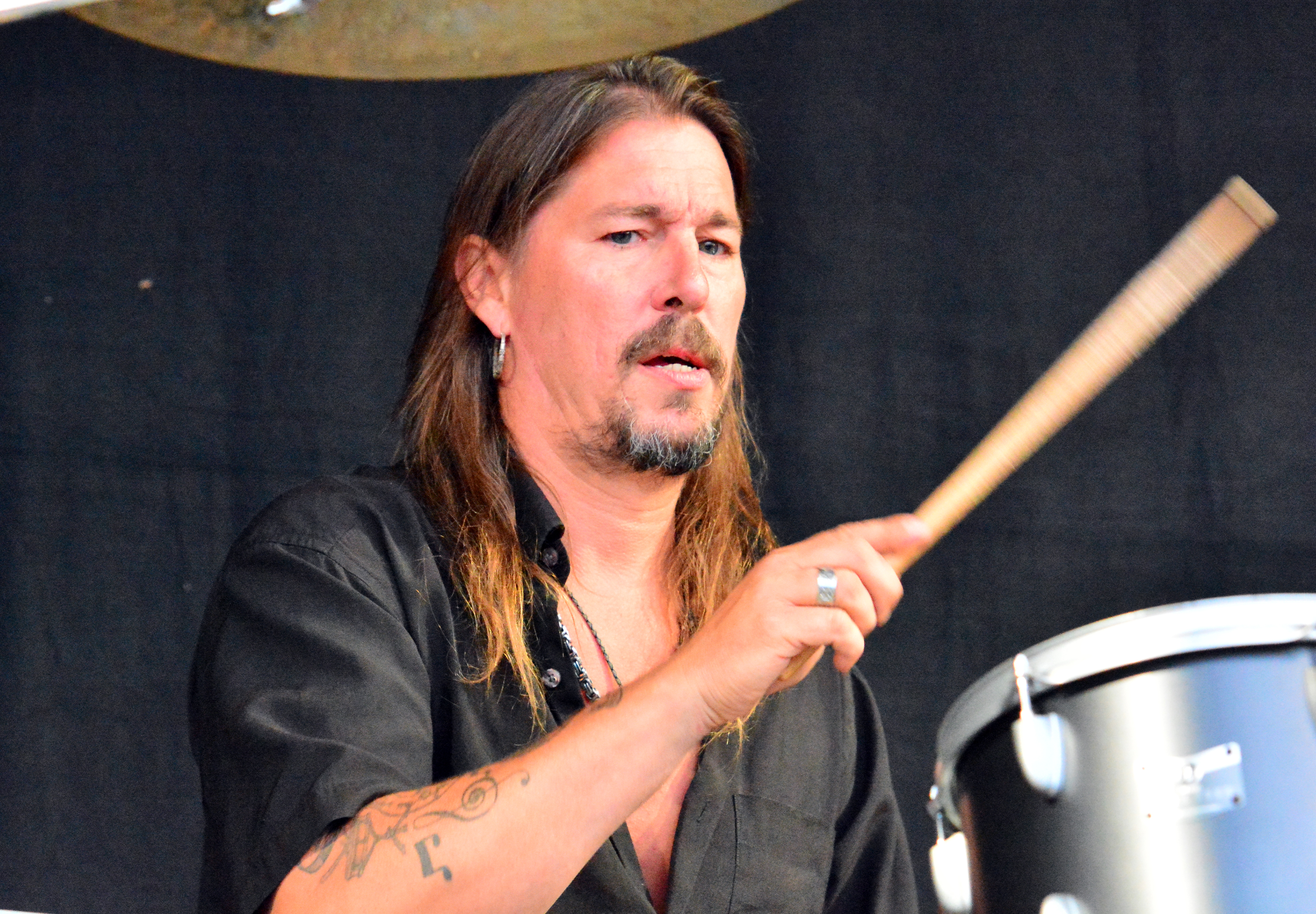 Karsten Kreppert von Kneipenterroristen, Zed Yago, Kickhunter und Bon Scott beim Tower-Festival 2014